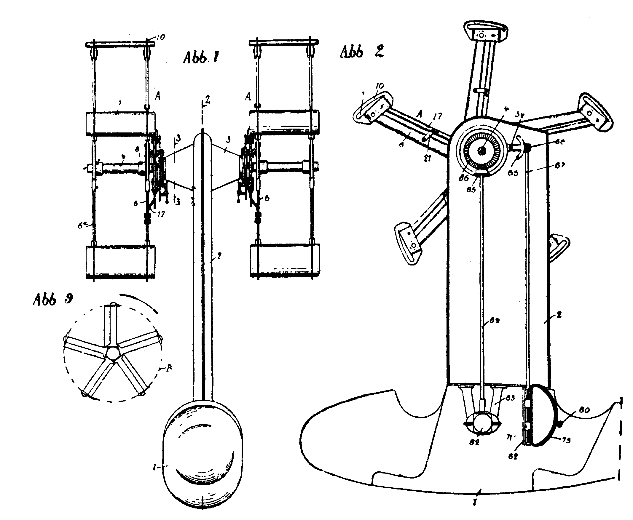 Схема цикложира Странджера в патентной заявке 1924 года